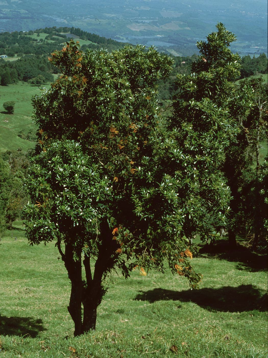 Drimys granadensis, Winteraceae, parasitiert von Psittacanthus schiedeanus, Riemenblumengewächse (Loranthaceae) – Costa Rica: Prov. Alajuela, Cordillera Central, Südhand des Volcán Poás W Poasito